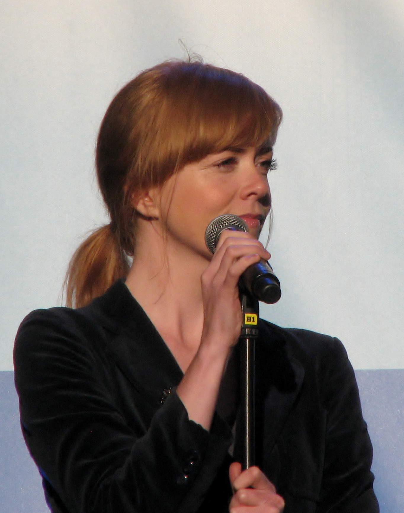 Marvi Vallaste esinemas Londoni olümpiamedalistide tervituspeol